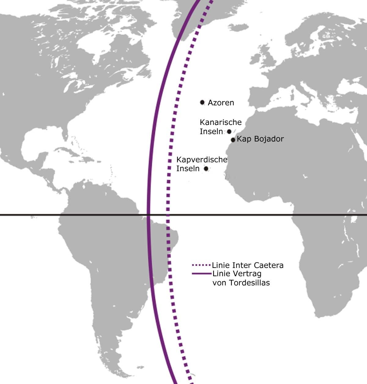 Abgrenzung der Gebiete Kastiliens und Portugals im Atlantischen Ozean nach der Bulle Inter Caetera vom 4. Mai 1493 und dem Vertrag von Tordesillas vom 7. Juni 1494.